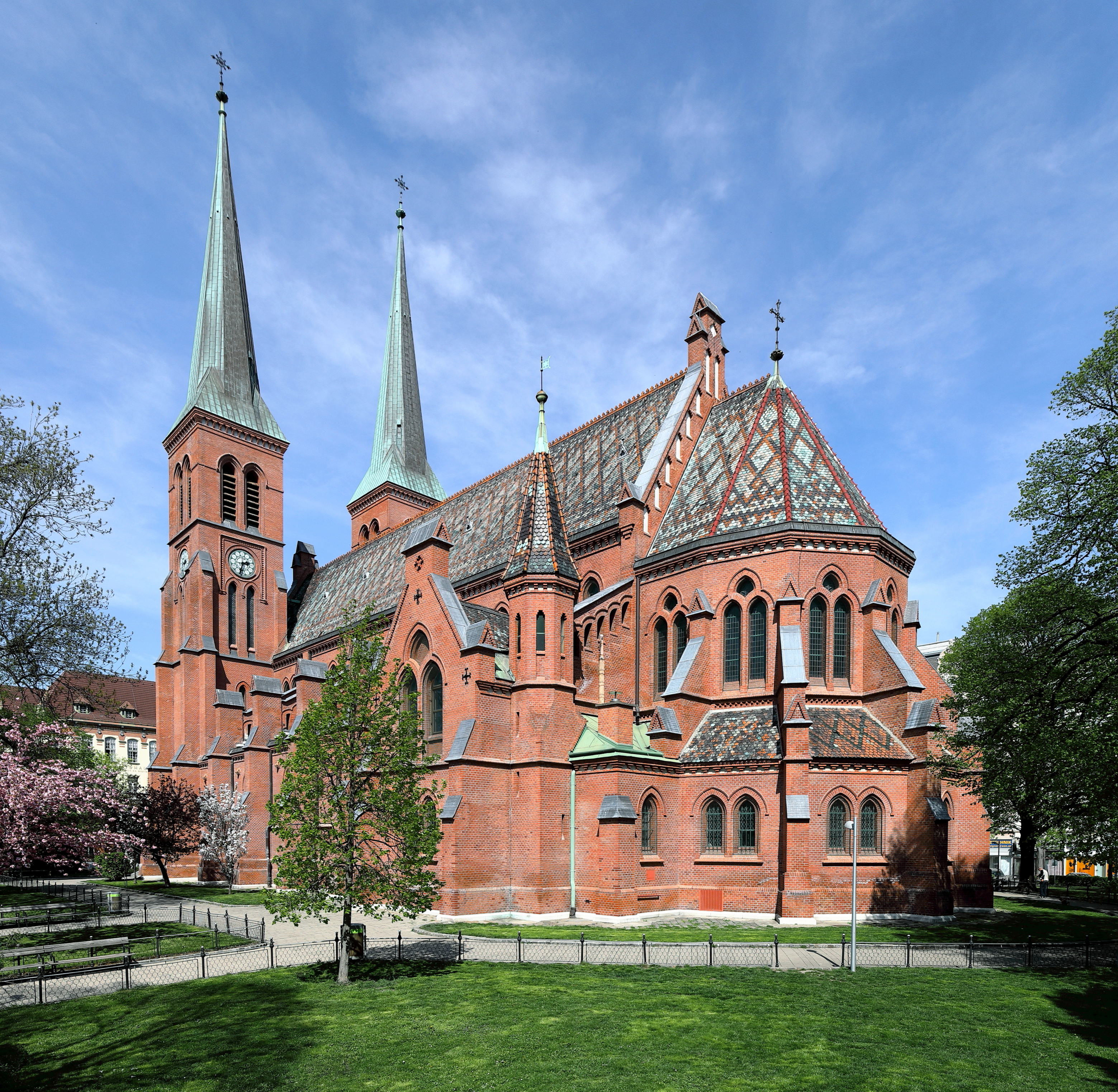 Die röm.-kath. Pfarrkrich hl. Brigitta im 20. Wiener Gemeindebezirk Brigittenau. Der Backsteinbau mit bunt glasiertem Ziegeldach im „italienisch-neugotischem Stil" wurde ab 1867 nach Plänen des Architekten Fiedrich Schmidt erbaut und am 31. Mai 1874 durch Kardinal Rauscher geweiht.